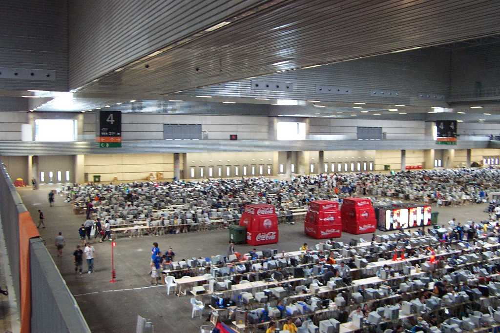 Euskal Encounter 2004. Image by Quique251.